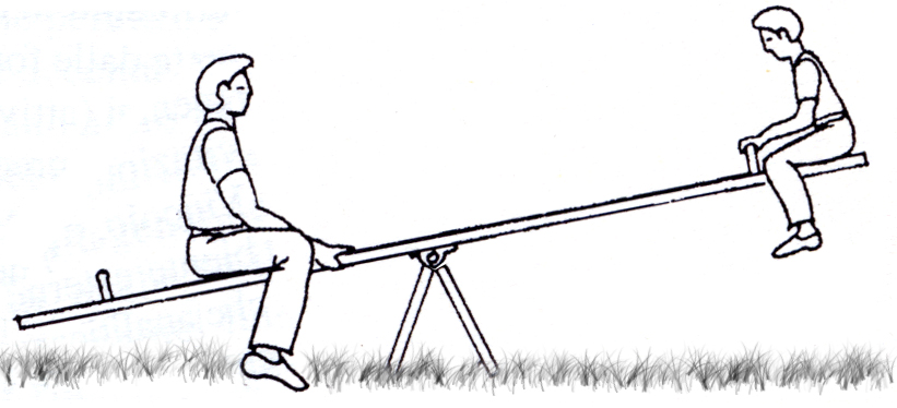 Altalena